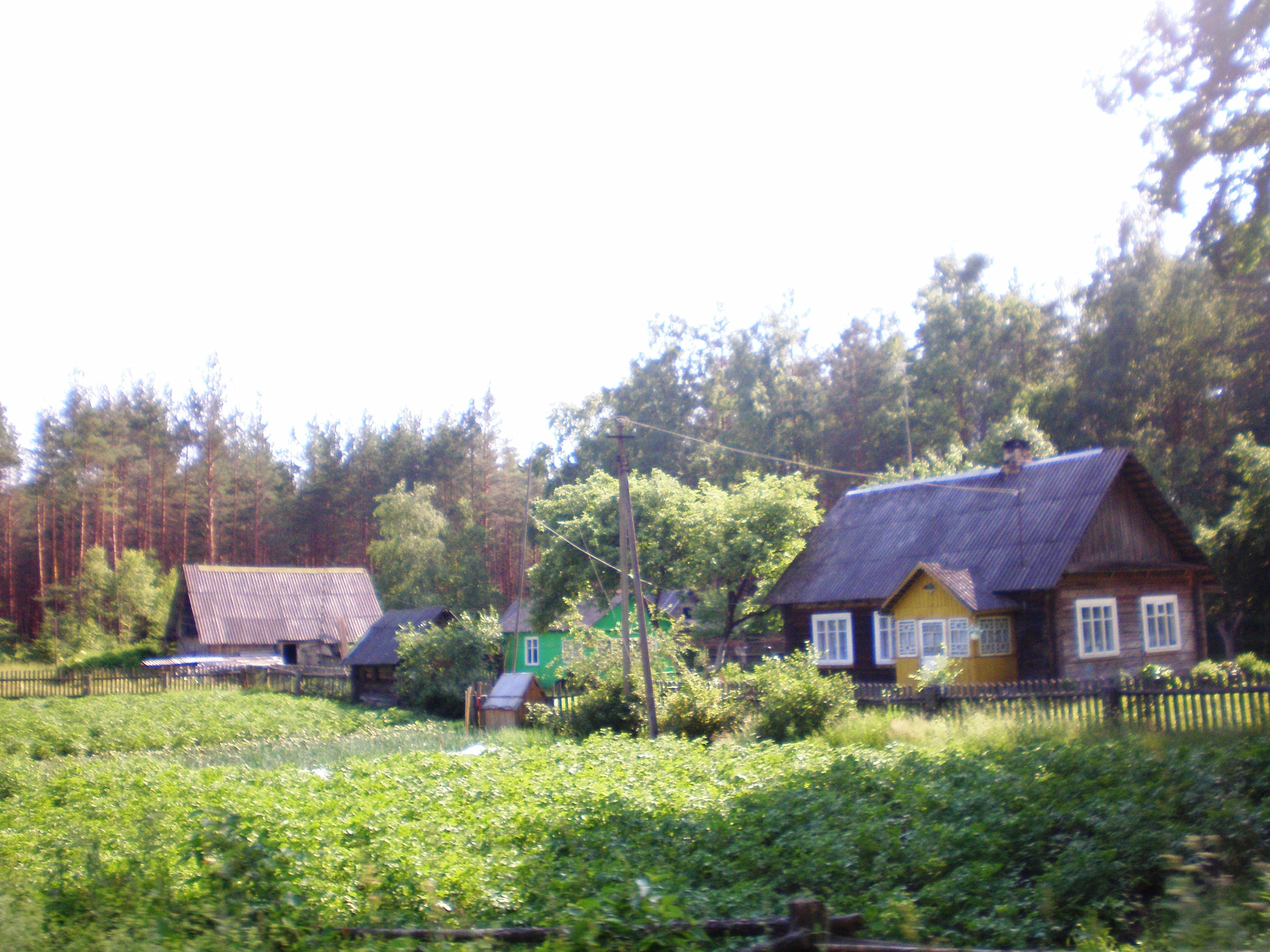 Šumas (Krokšlys), Dzūkijos NP, Varėnos raj.